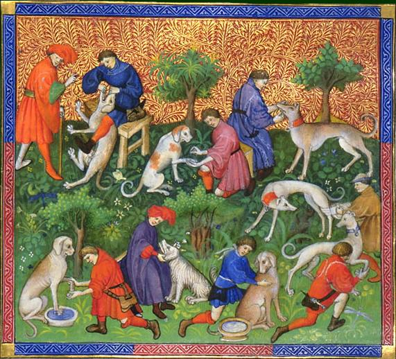 Département des manuscrits, Français 616 folio 40v, 1387-89, illustrated 1405-10